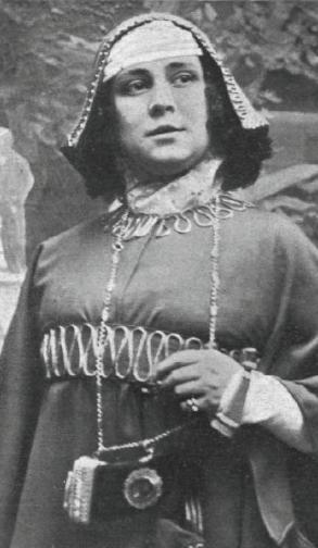 La actriz Matilde Moreno representando la obra de teatro Cuento de abril, de Ramón María del Valle-Inclán